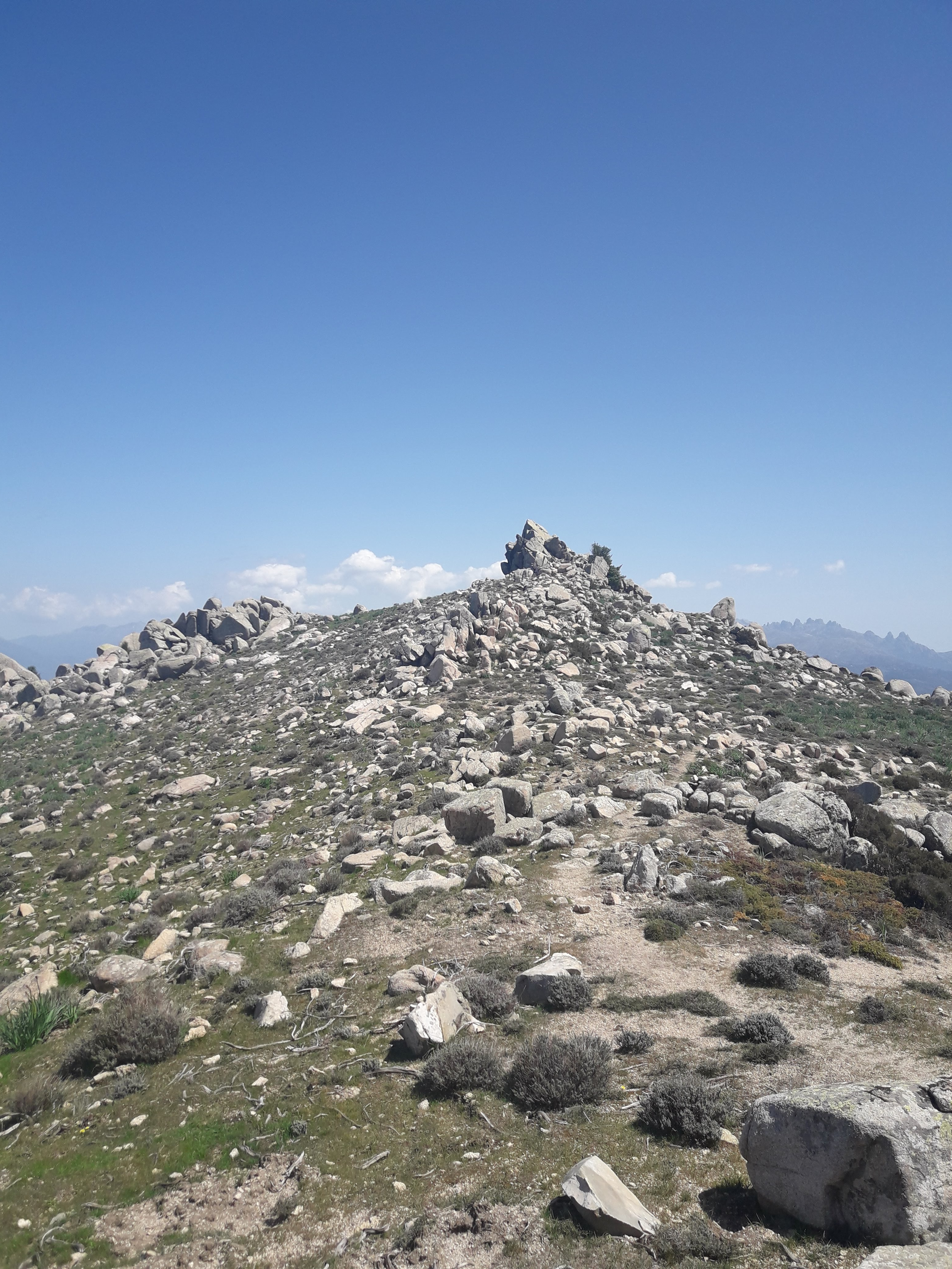 Monte San Petru (vue du relais)